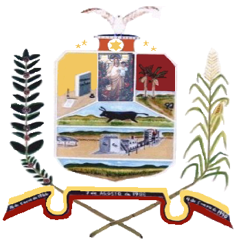 Escudo del municipio Candelaria. Estado Trujillo. Venezuela